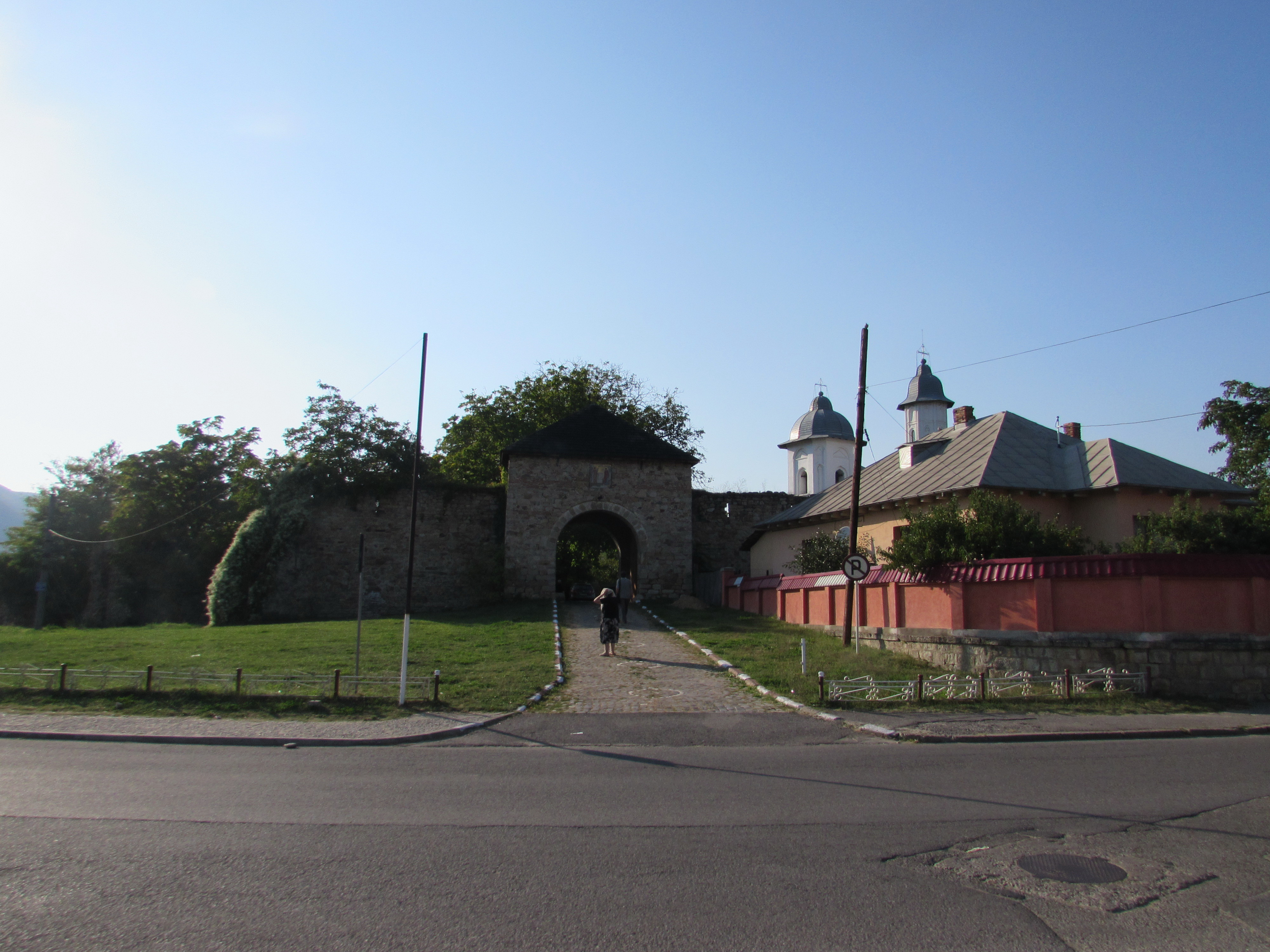 Fosta Mănăstire Răducanu din Târgu Ocna